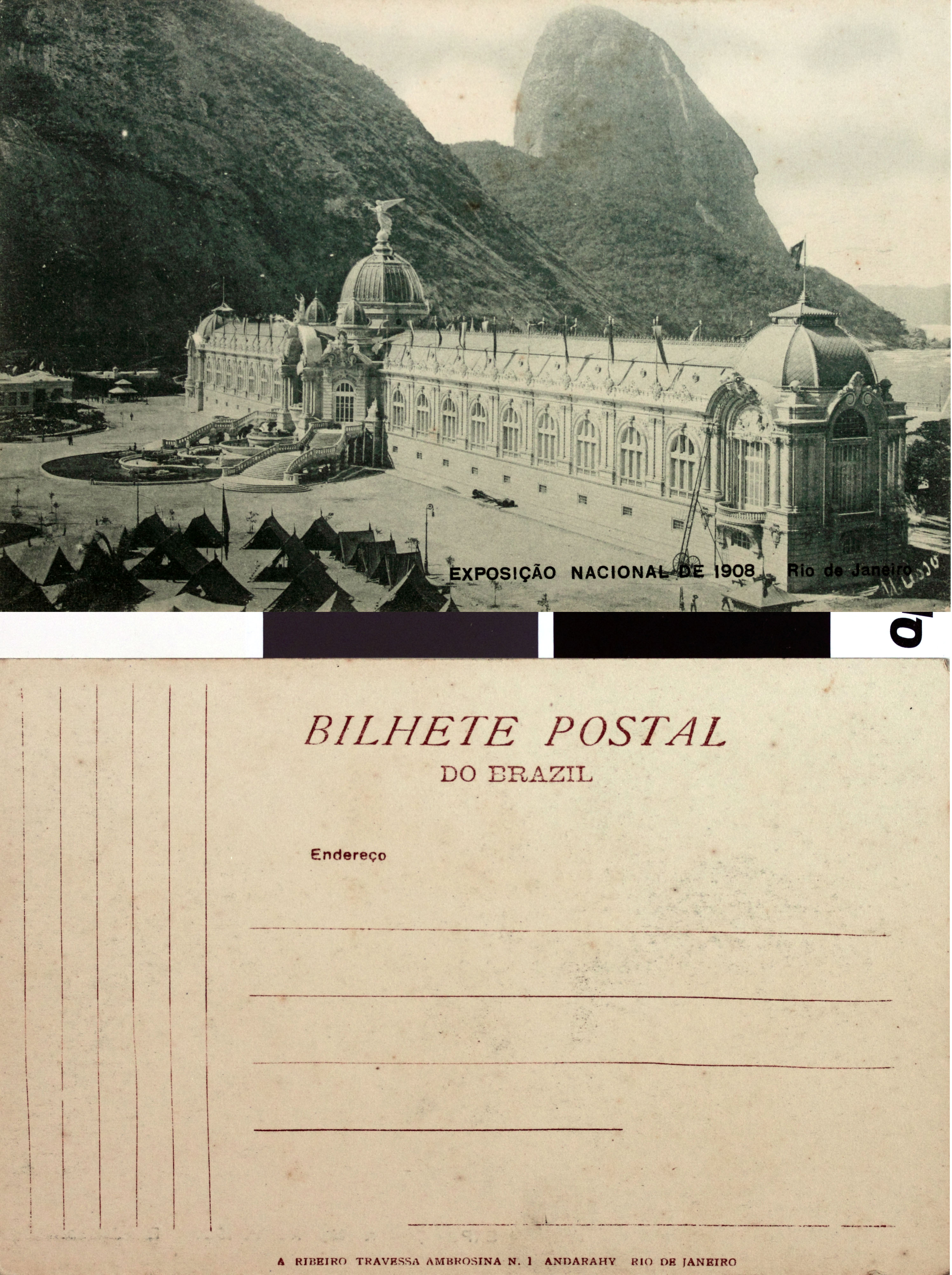 Realizada na Praia Vermelha, no Rio de Janeiro.